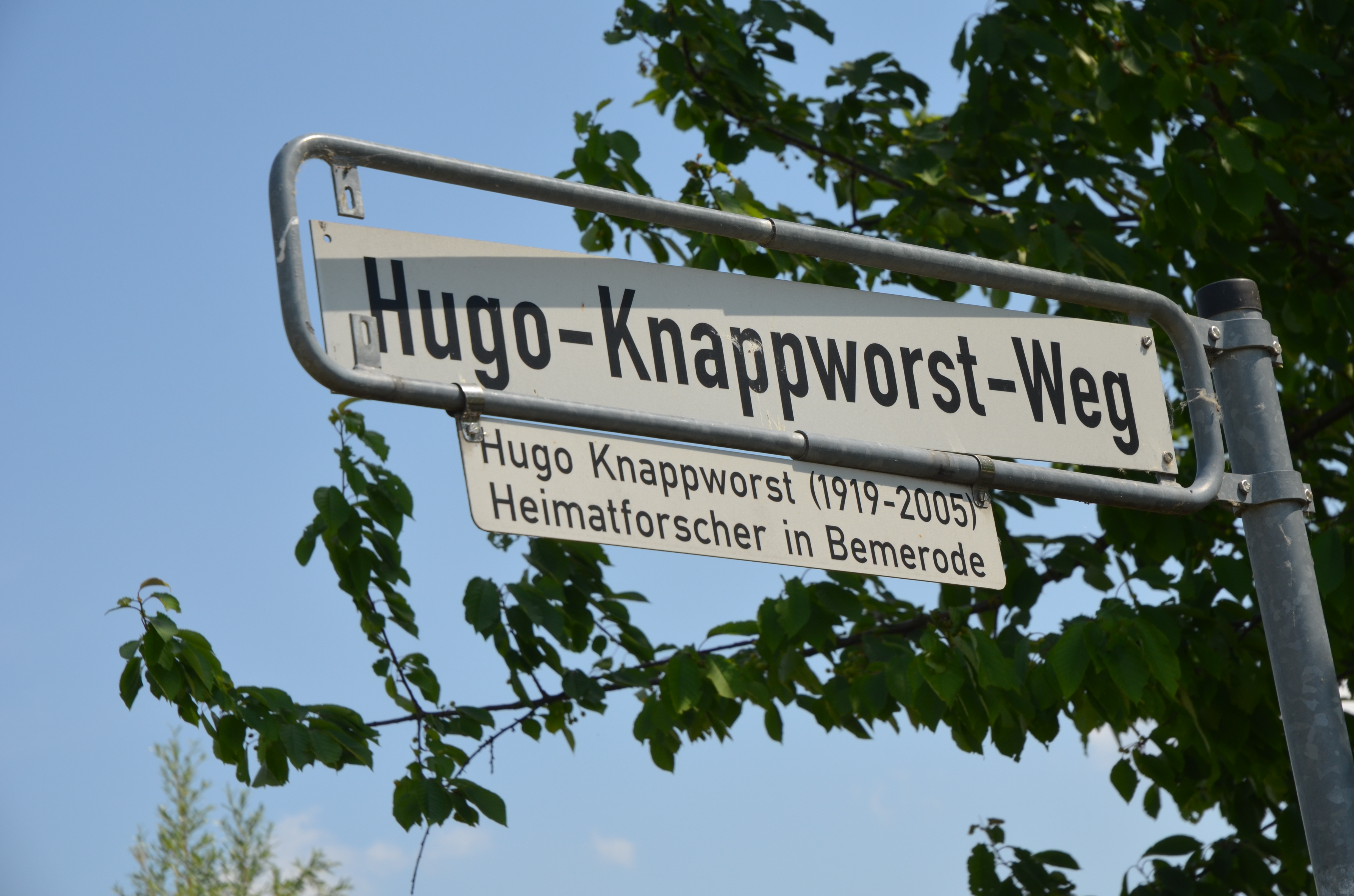 Straßenschild mit gesonderter Legendentafel des nach Hugo Knappworst benannten Hugo-Knappworst-Weg auf dem Kronsberg in Hannover-Bemerode ...